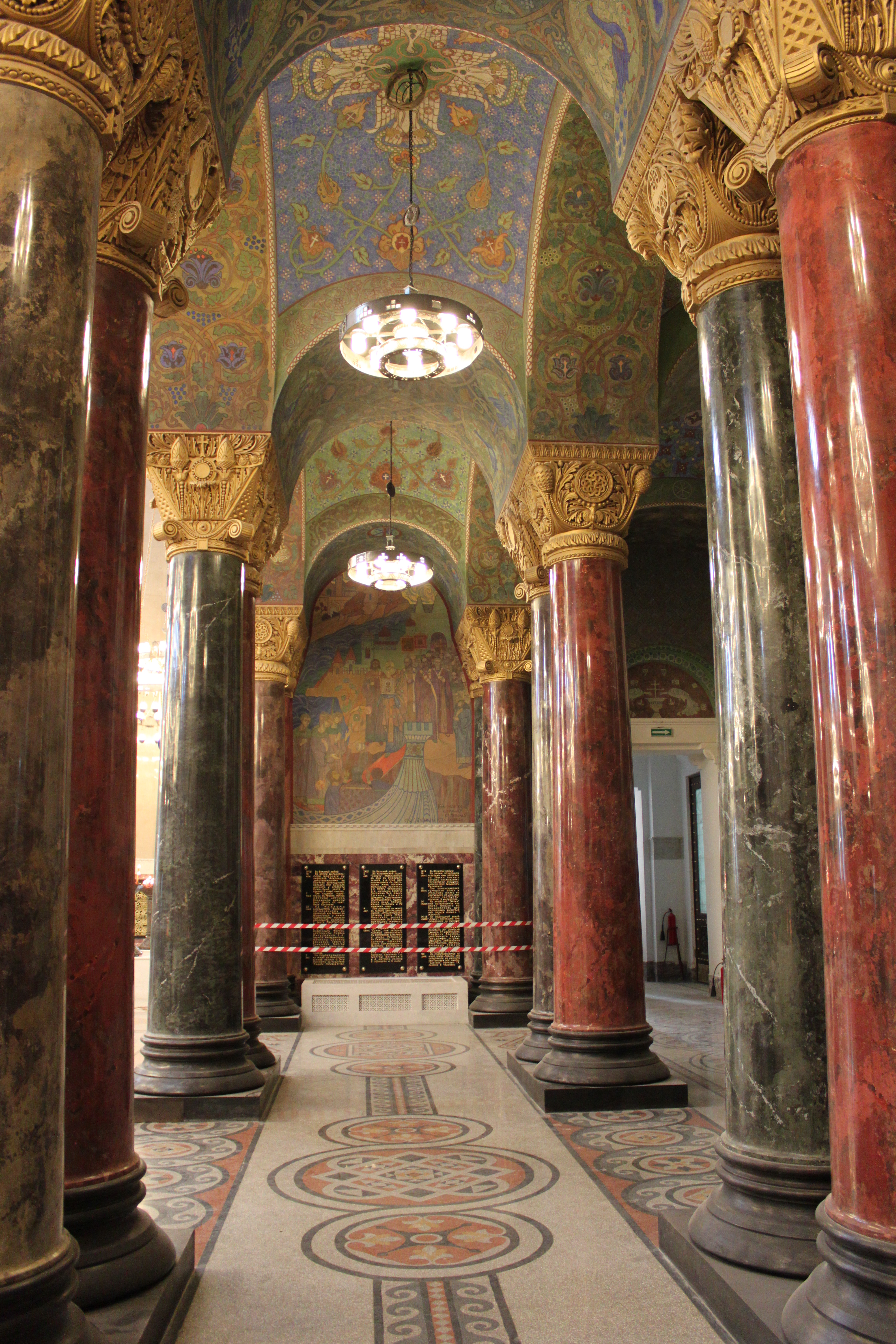 Собор Никольский Морской (Санкт-Петербург, Кронштадт, Якорная площадь, 5)